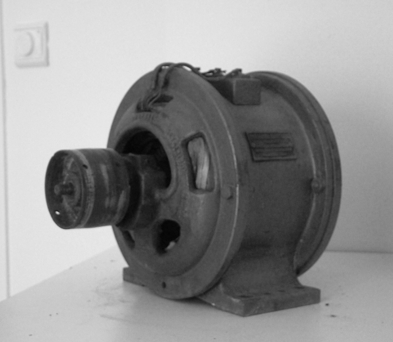 Moteur N° 28304